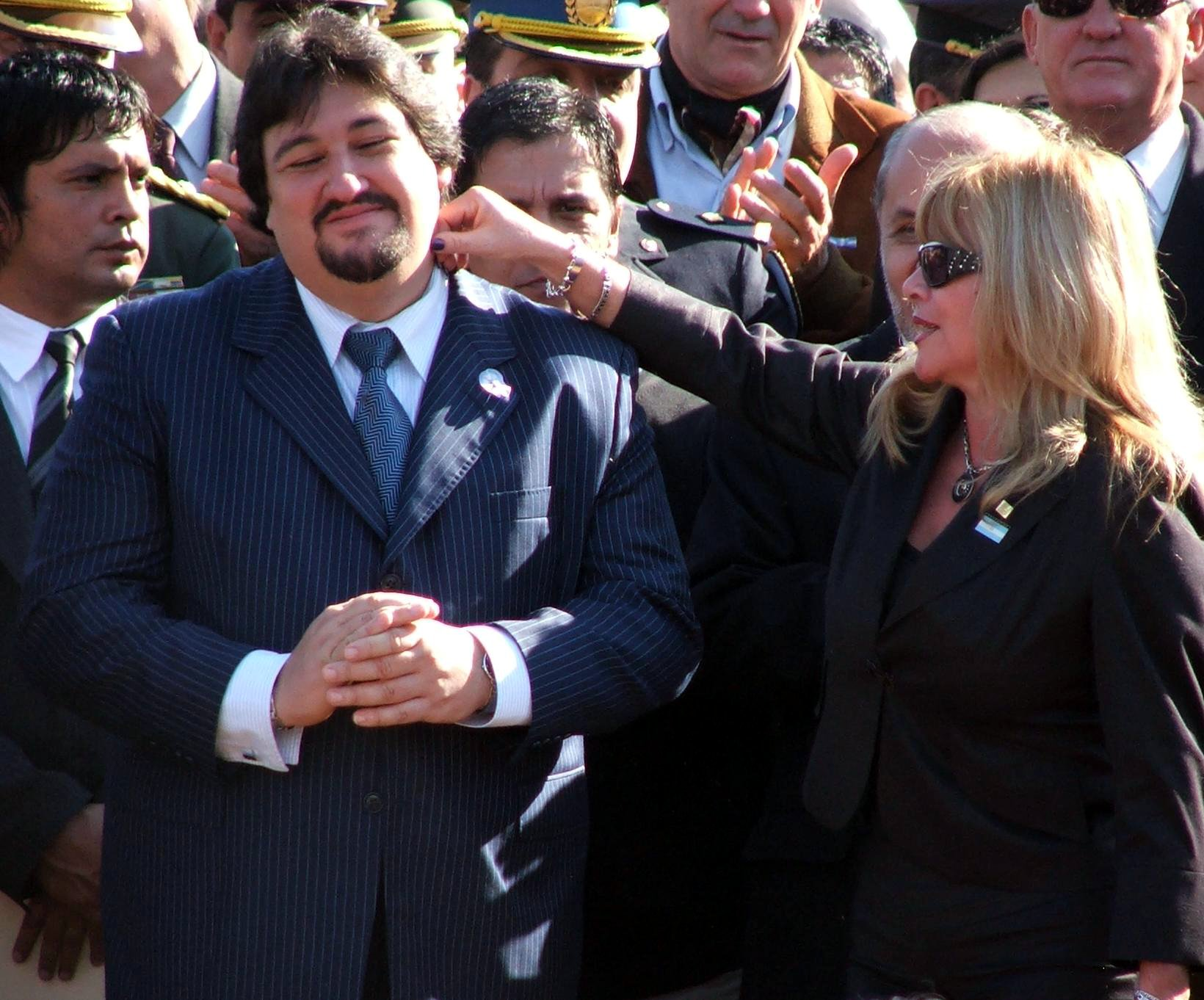 El gobernado de la provincia de Misiones Maurice Closs junto a la diputada nacional Stella Maris "Marilú" Leverberg.